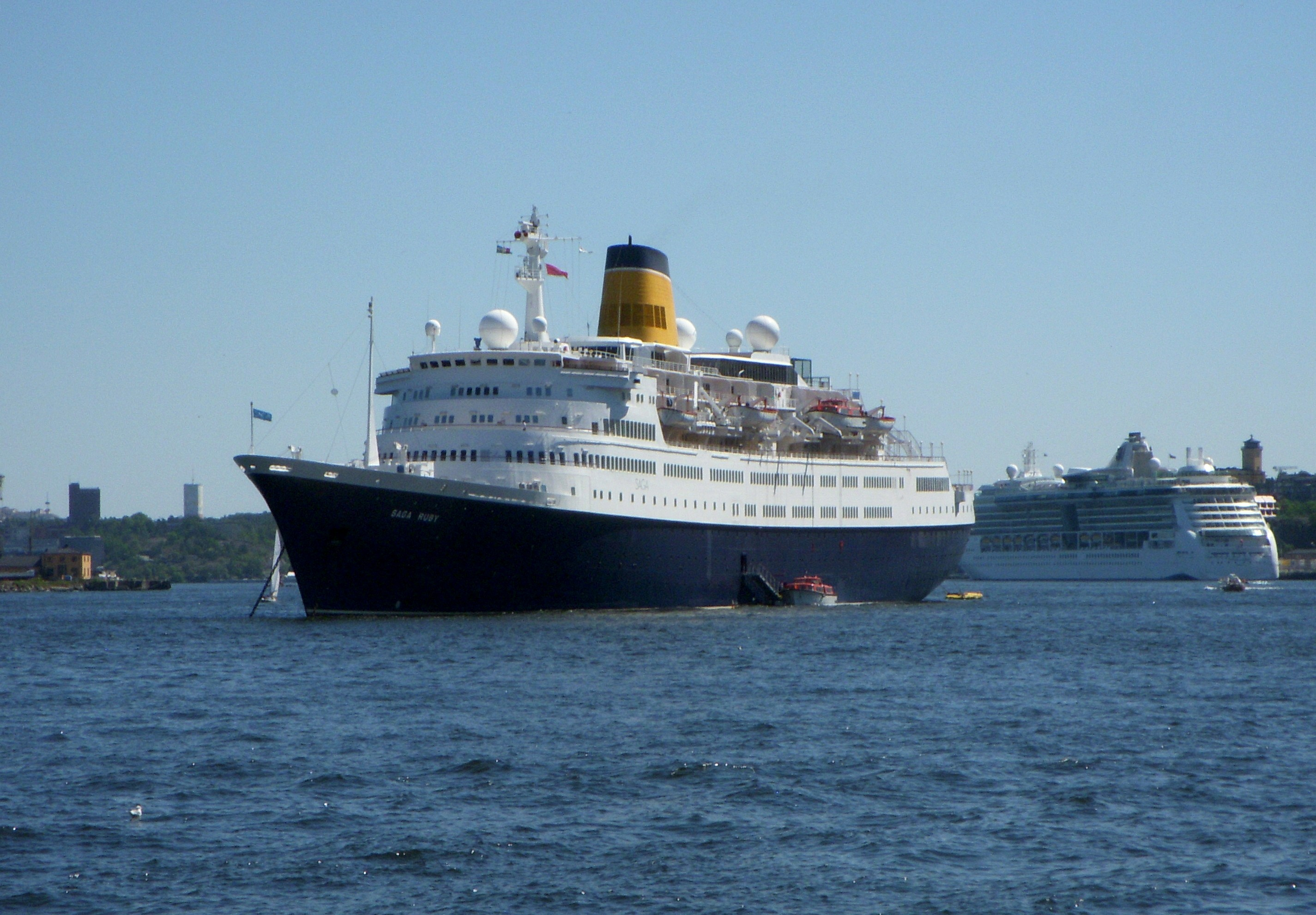 Kryssningsfartyget "M/S Saga Ruby" ankrar i Stockholm